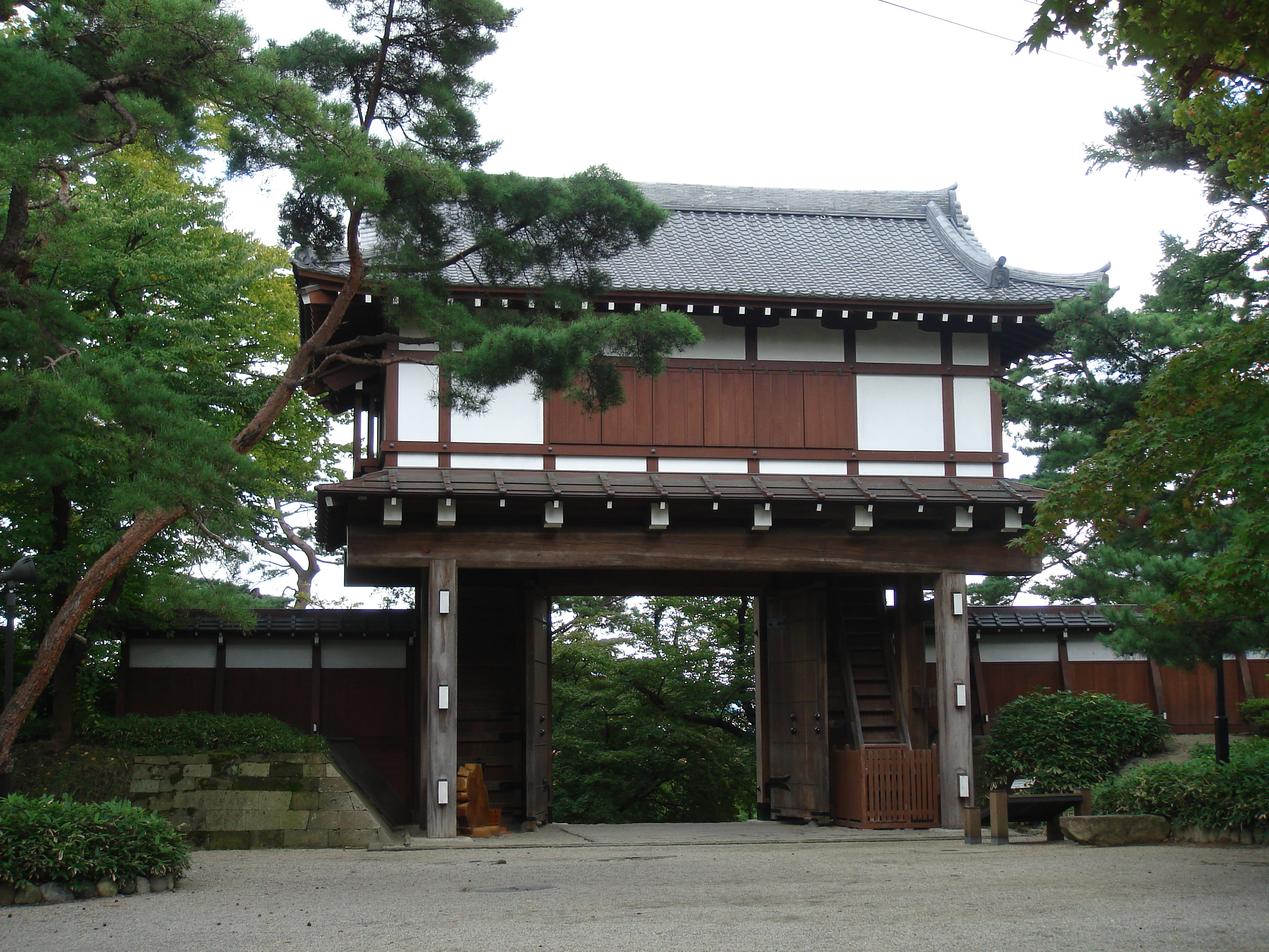 秋田県・久保田城復元本丸表門